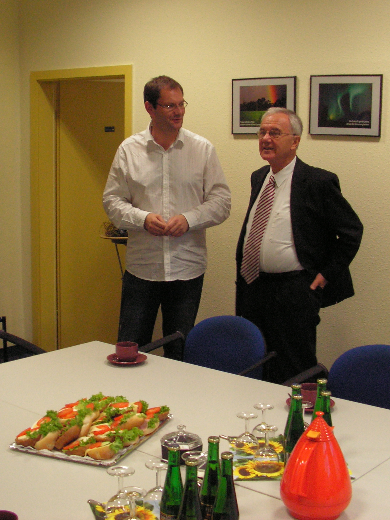 Manfred Stolpe am 24. Okt. 2006 zu Besuch im Medienhaus Eberswalde im Gespräch mit Chefredakteur Christian Trill